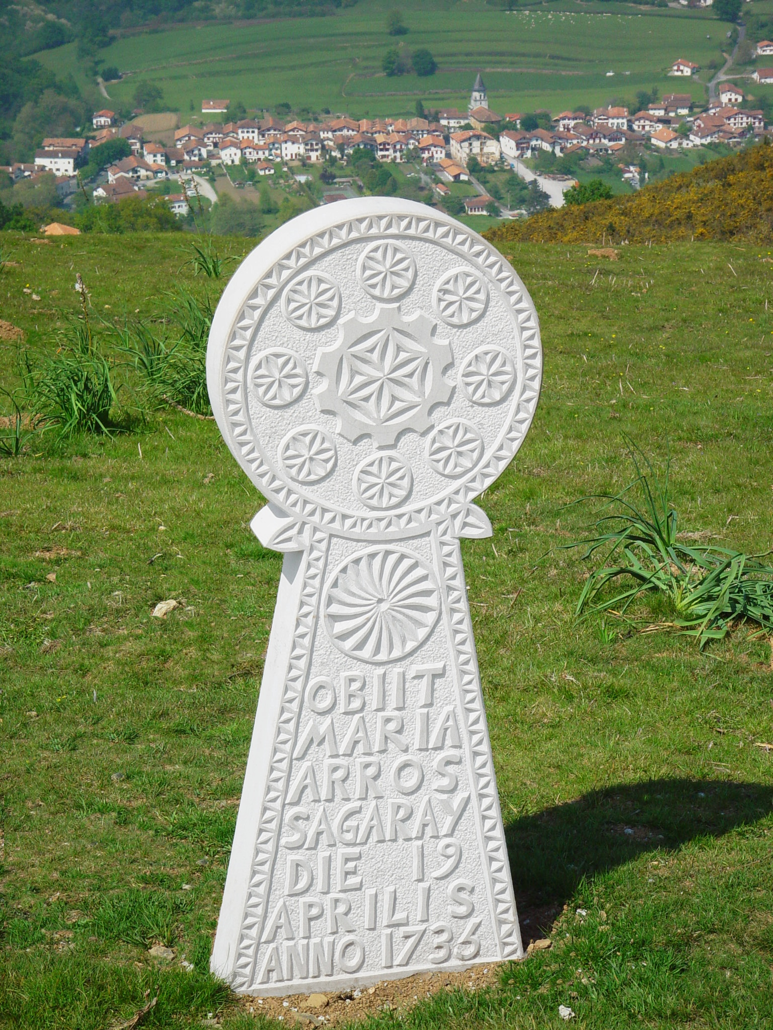 Disko-formako hilarri faksimila Ainhoan, Lapurdin.